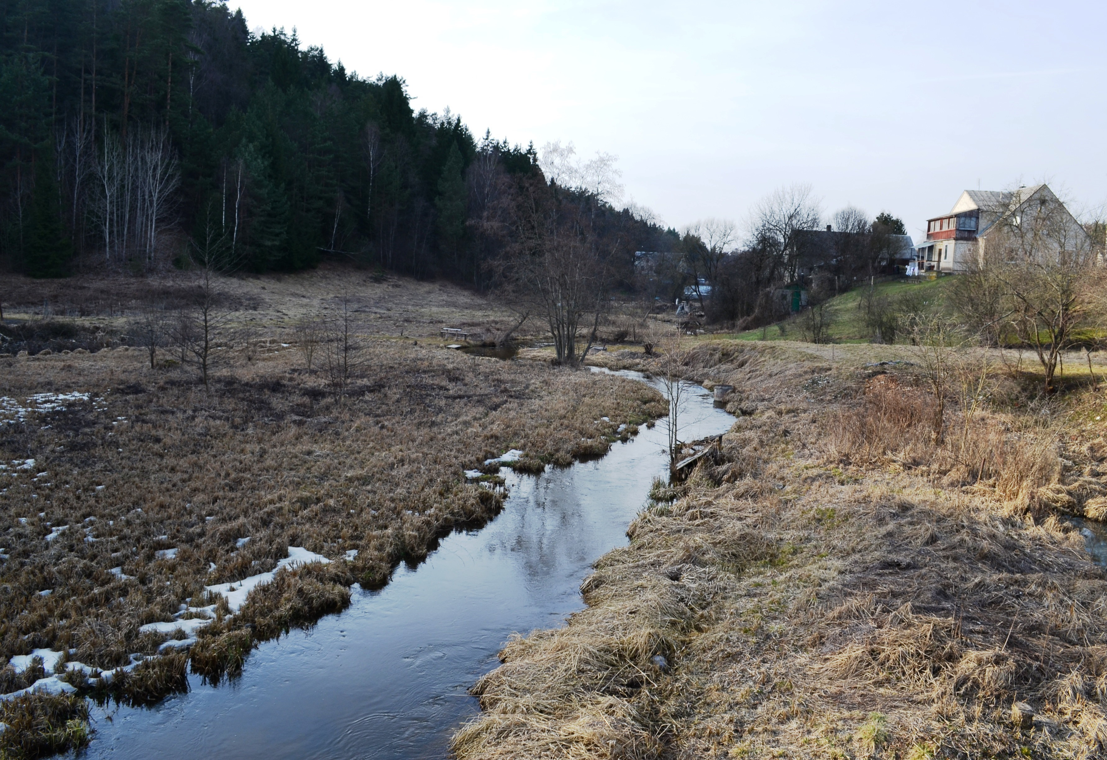 Riešės upelis, Verkių Riešė, Vilnius